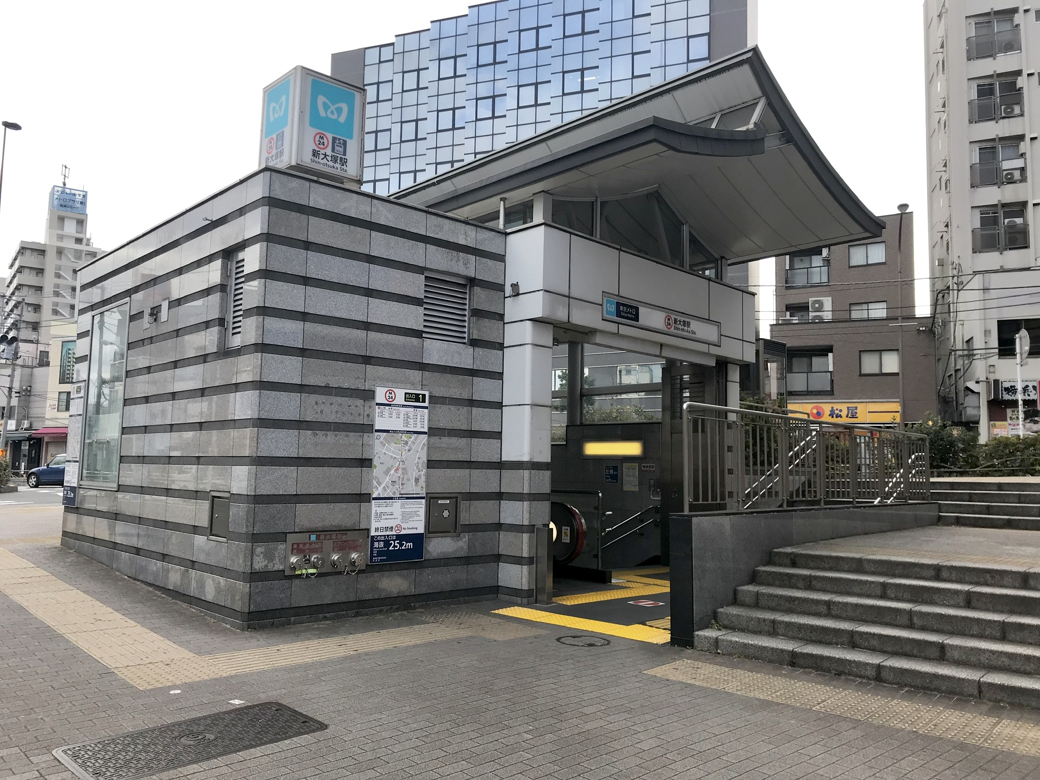 東京メトロ丸ノ内線新大塚駅1番出入口